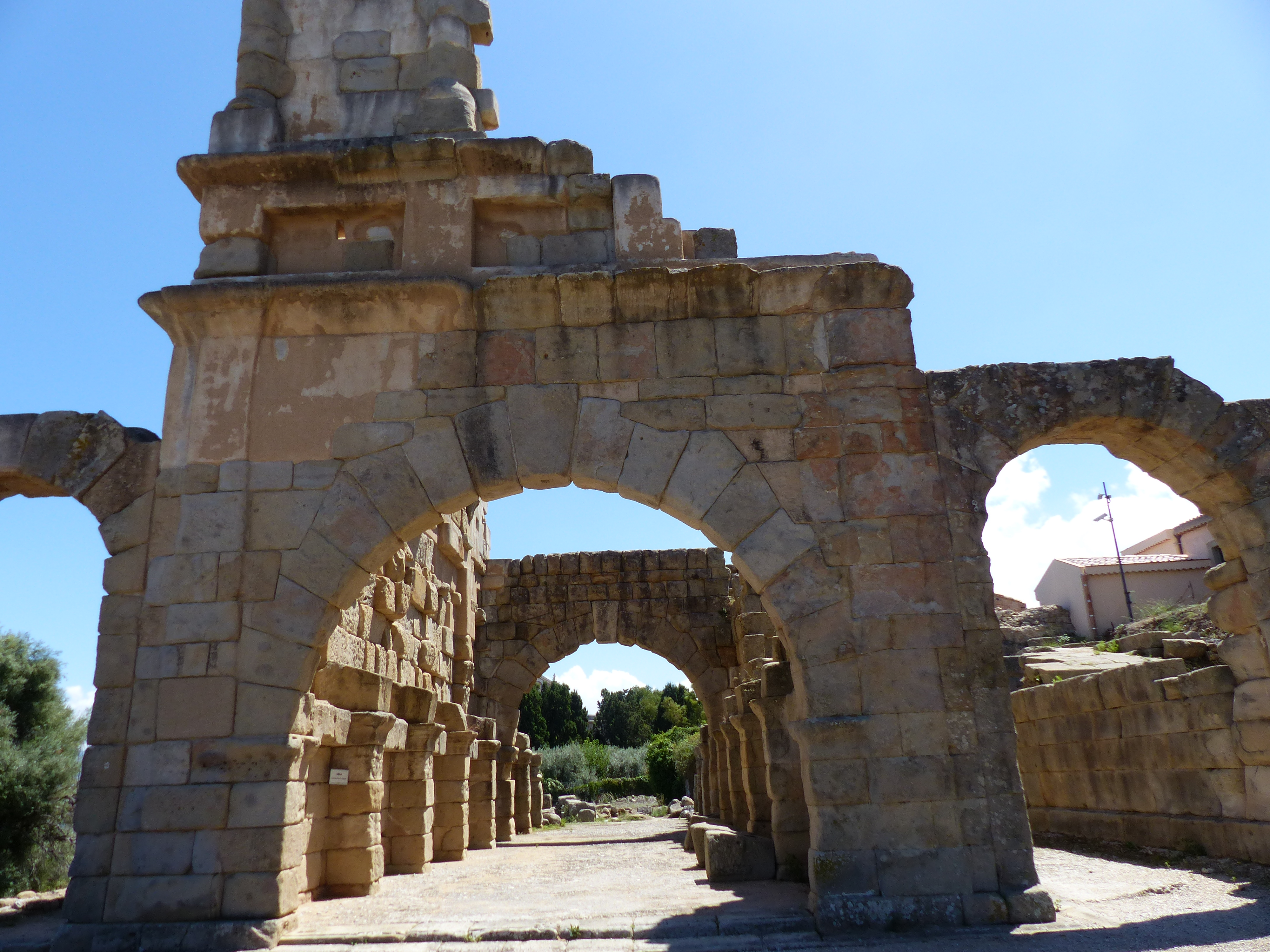 Arco entrada, Tindari, Sicilia.